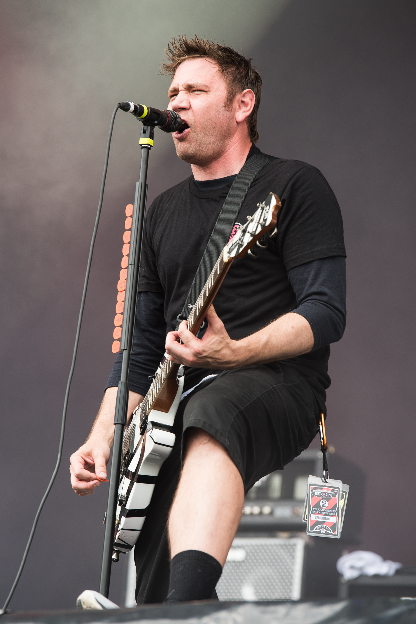 ARGO-Konzerte,Festival,Konzert,Livekonzert,Livemusik,Matty Lewis,Musik,RiP,Rock im Park 2015,Seat Zeppelin Stage,Zebrahead